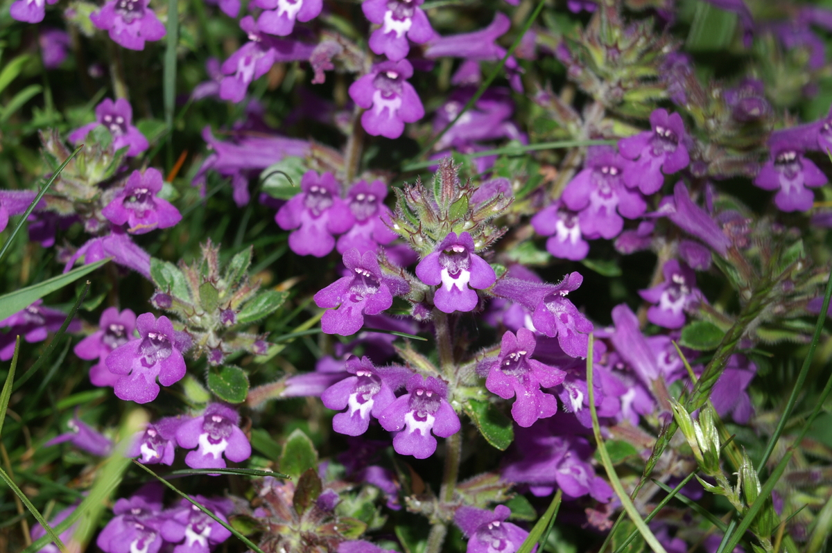 Alpski čober na Otlici.